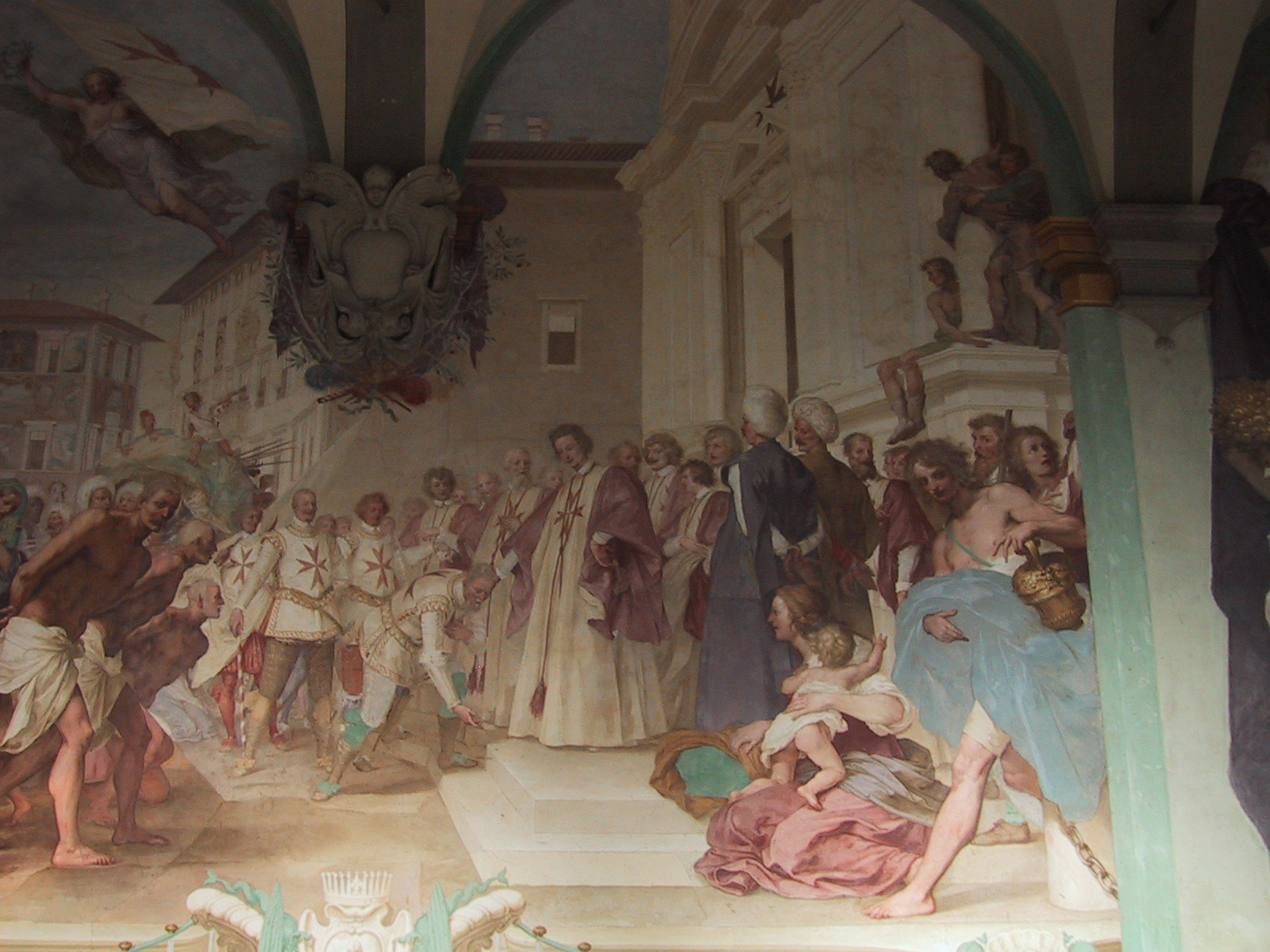 die fresken in der villa petraia